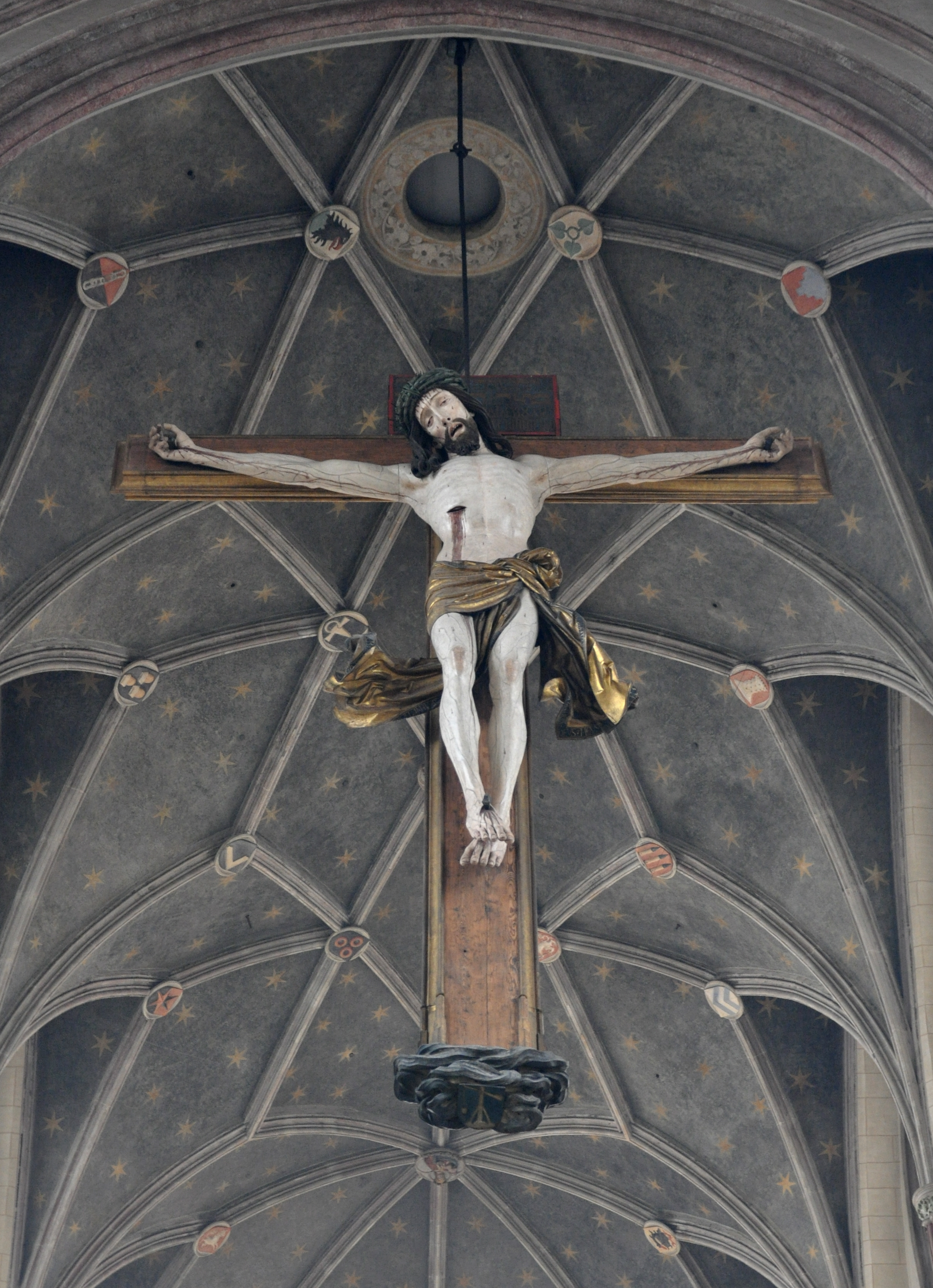 Landshut, St. Martin, moumentales Chorbogenkruzifix von 1495, Michel Erhart zugeschrieben (Länge: 8 m, Korpus: 5,40 m, zuletzt 2002 restauriert)